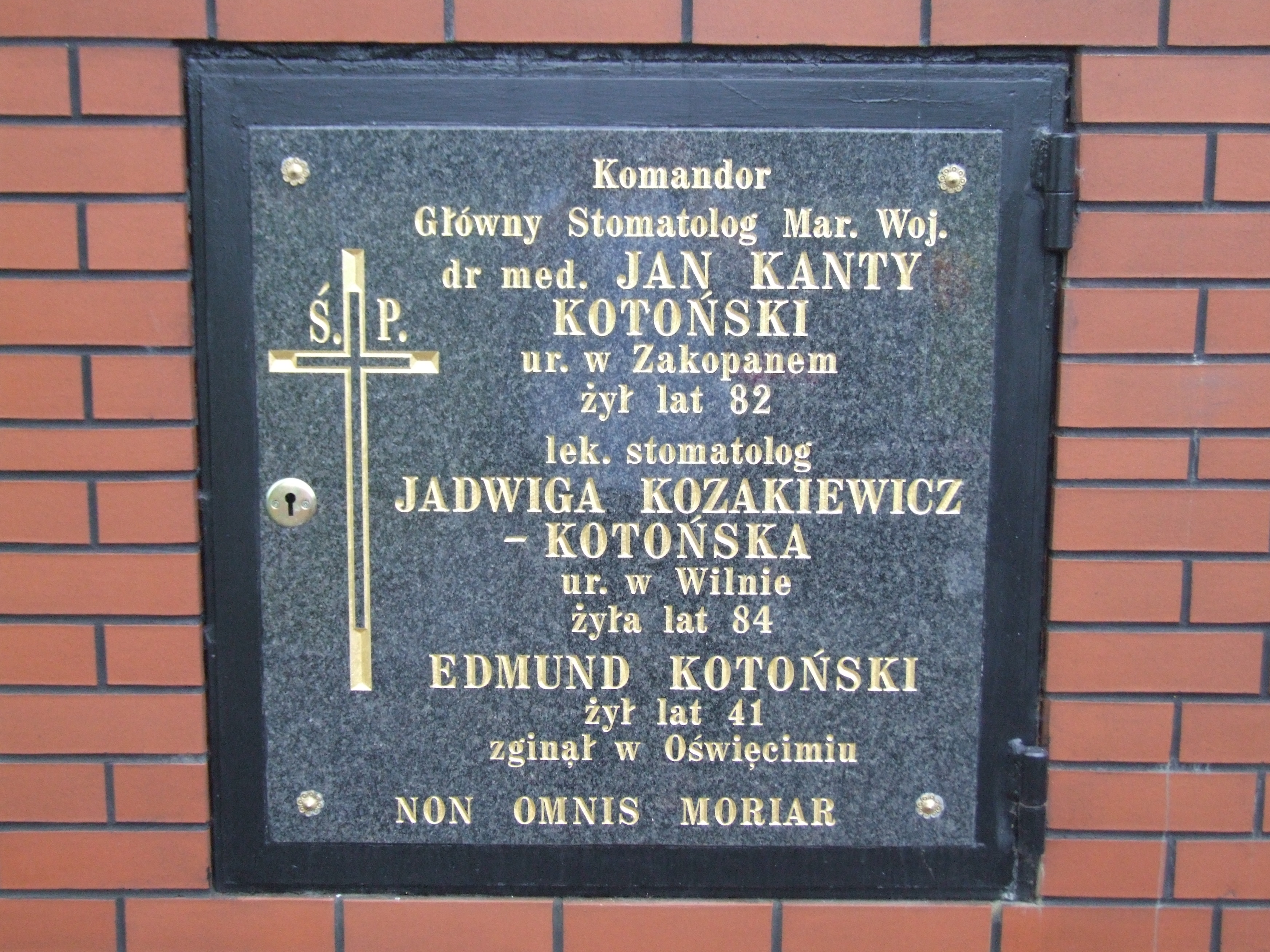 Gdynia-Oksywie Cmentarz Marynarki Wojennej